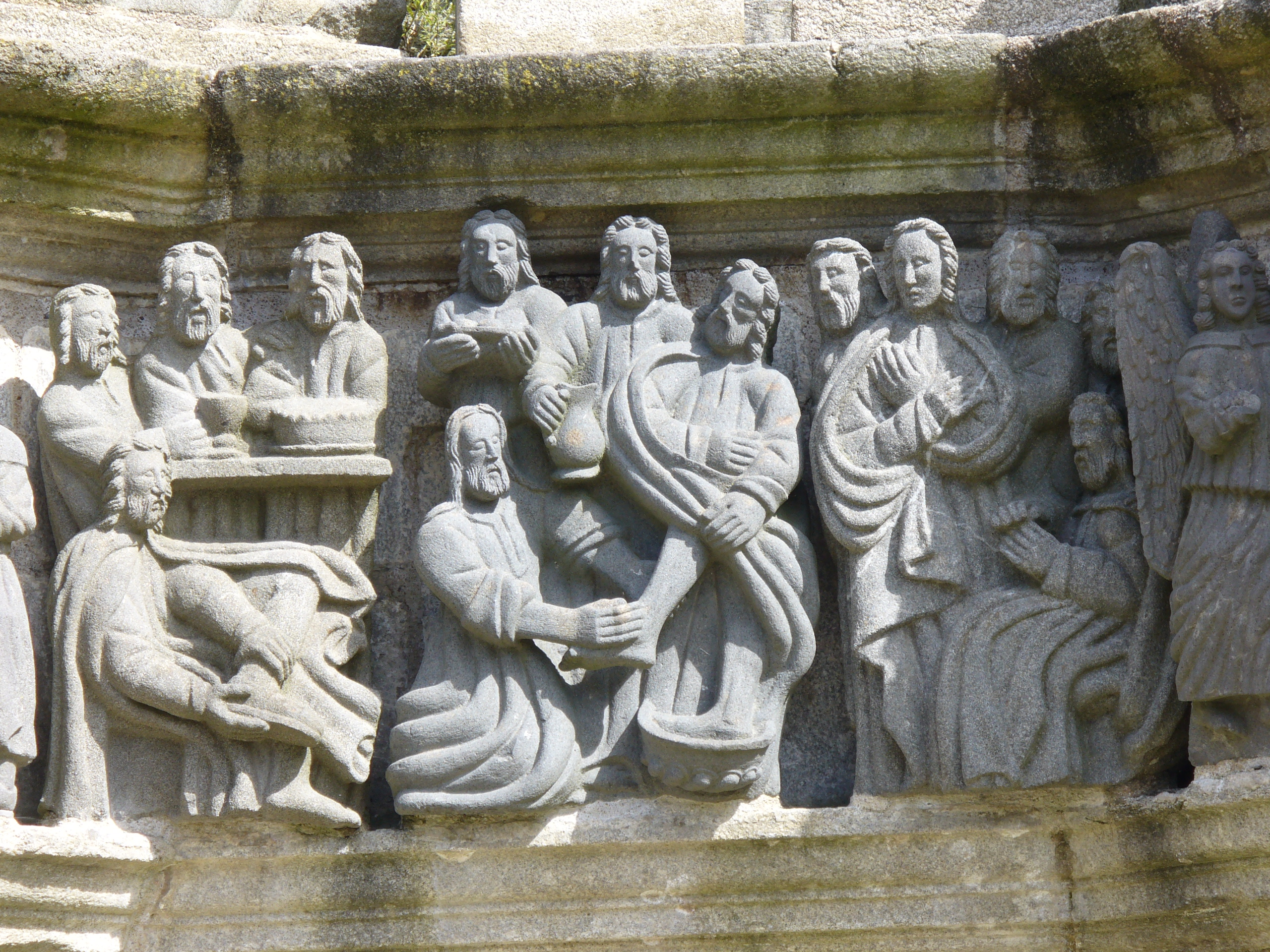 Le Lavement des pieds-Fußwaschung - Jesus wäscht Petrus und seinen Jüngern die Füße. Calvaire-Kalvarienberg-Guimiliau-Saint Miliau(1600)-Enclos Paroissal-Umfriedeter Pfarrbezirk